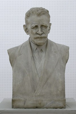 Προτομή του Κωστή Παλαμά, έργο του Κωνσταντίνου Δημητριάδη. Βρίσκεται στη συλλογή του Φιλολογικού Συλλόγου Παρνασού